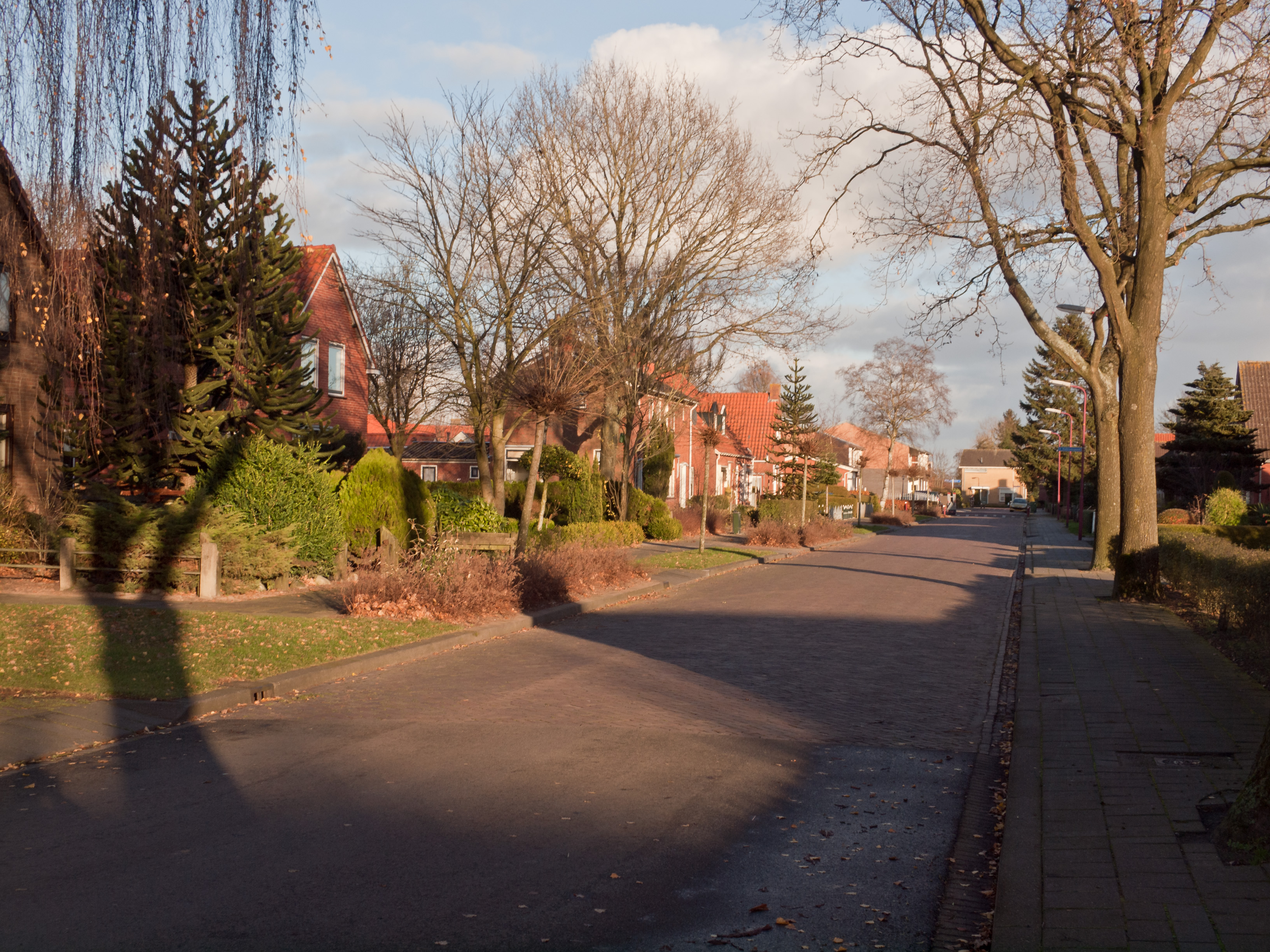 De Spekloane